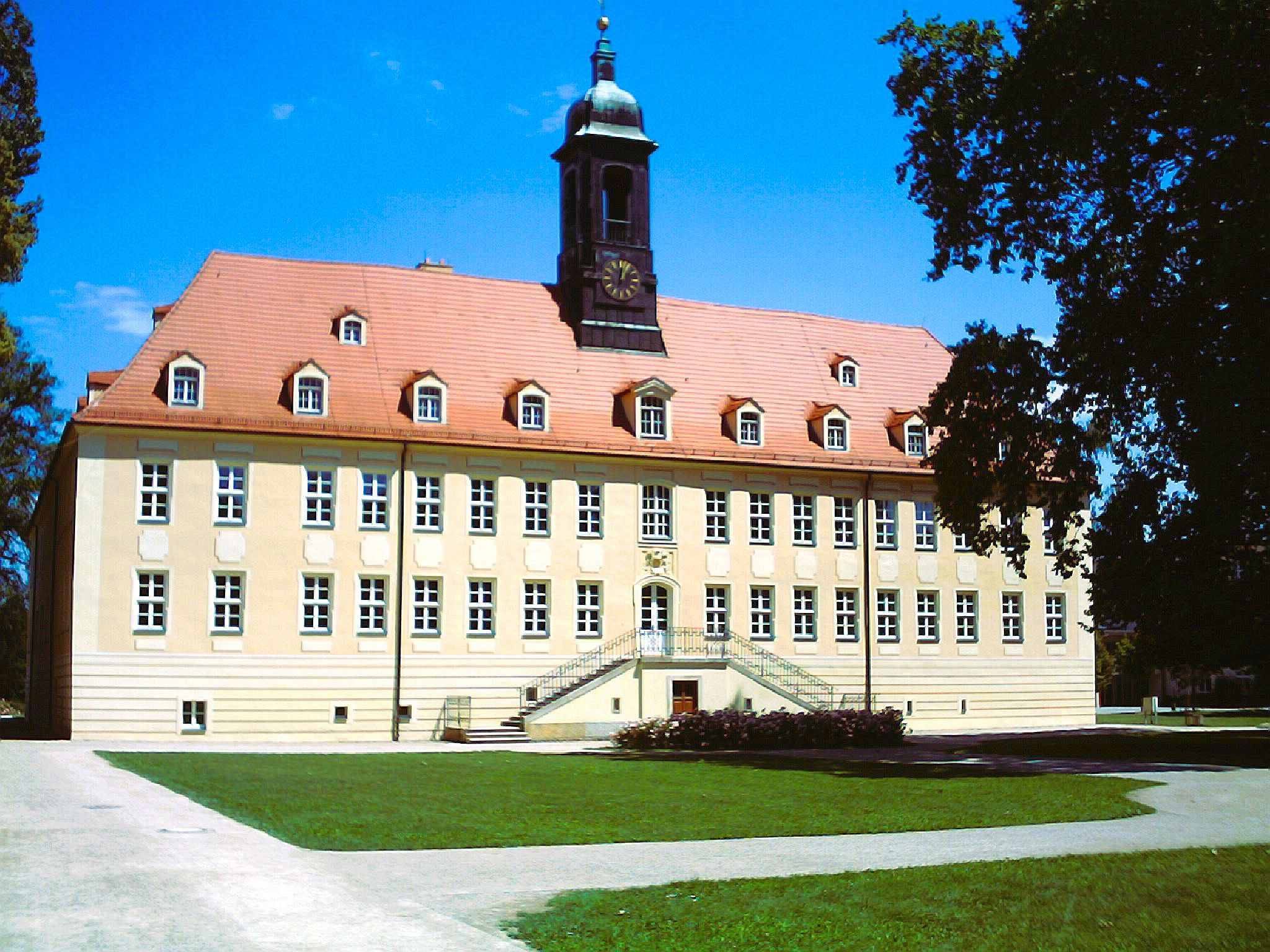 Ansicht des Elsterschlosses